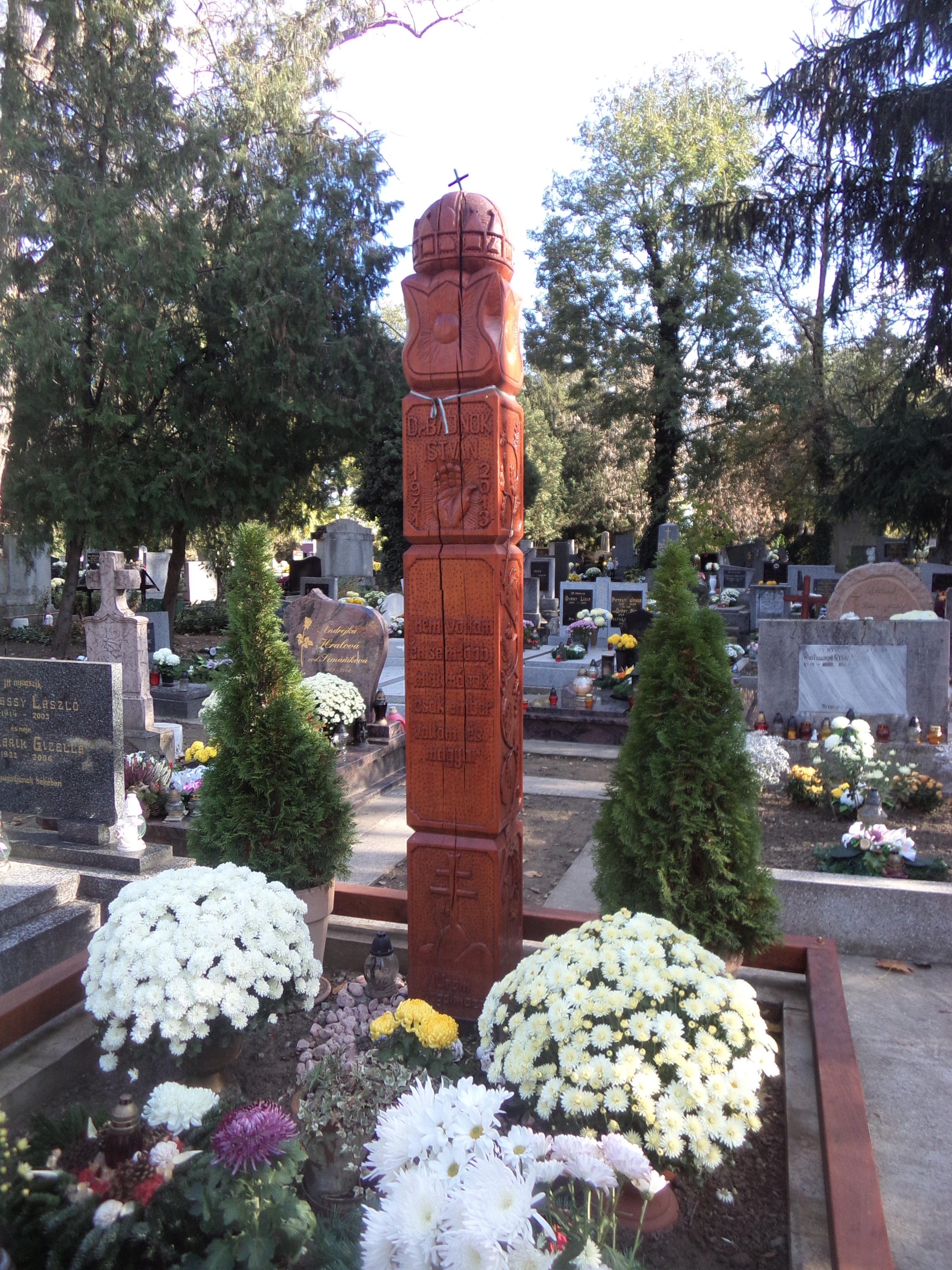 Komárom 2016